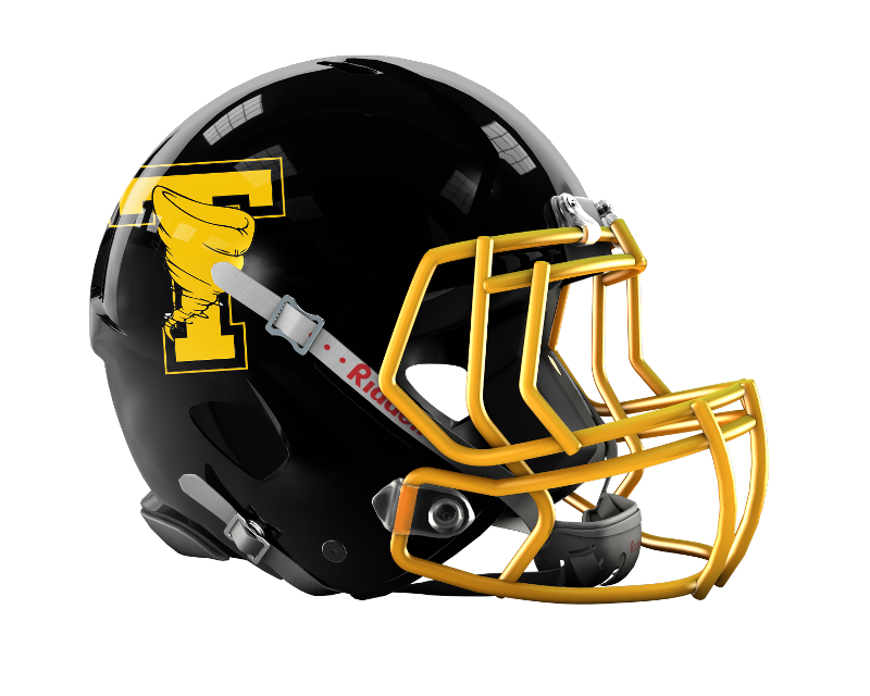 Twister Helm